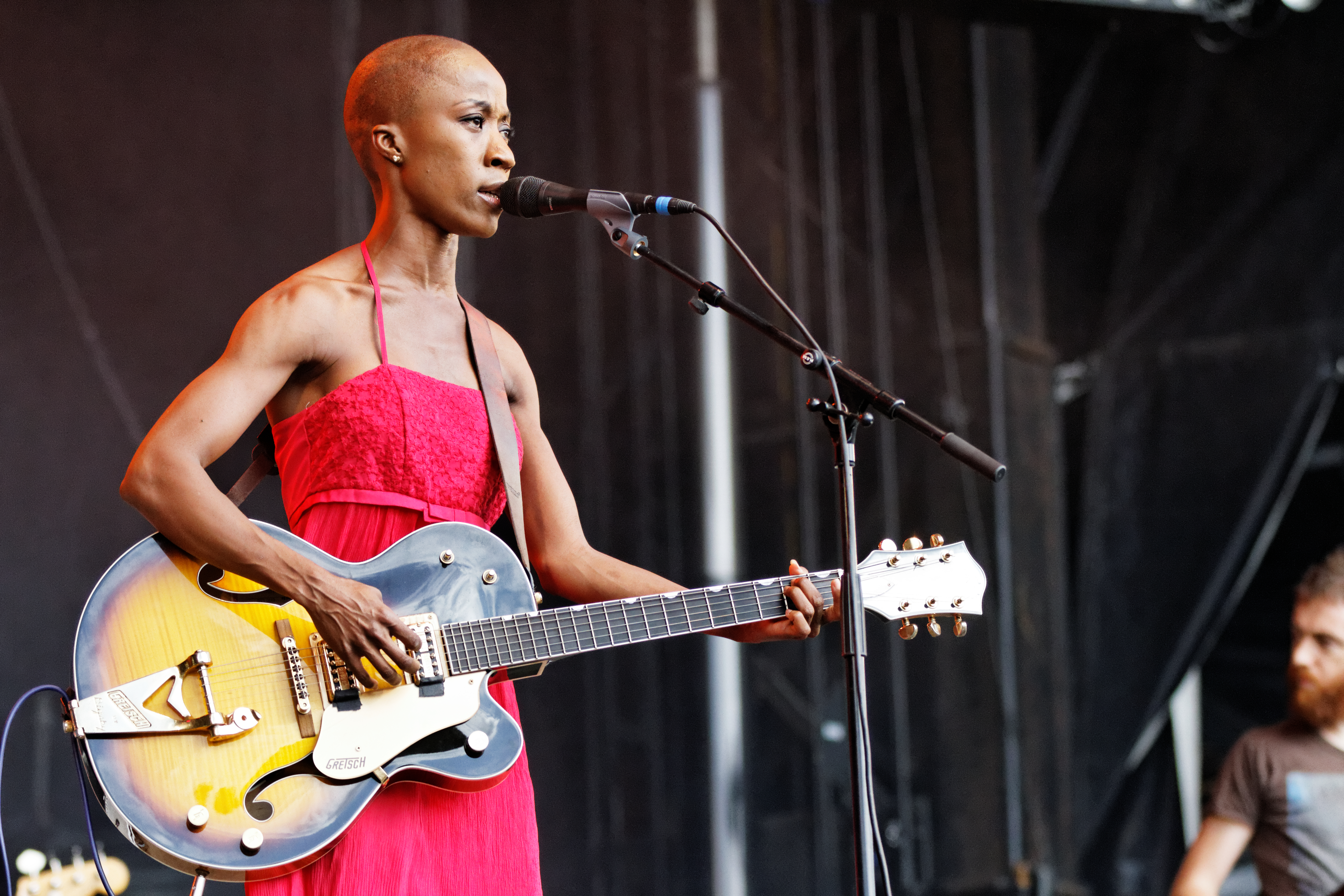 Rokia Traoré en concert sur la scène Landaoudec lors du festival du bout du Monde à Crozon dans le Finistère (France).